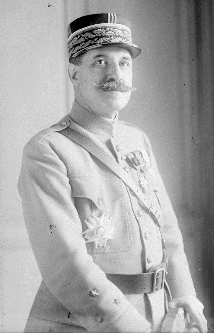 Pierre Berdoulat